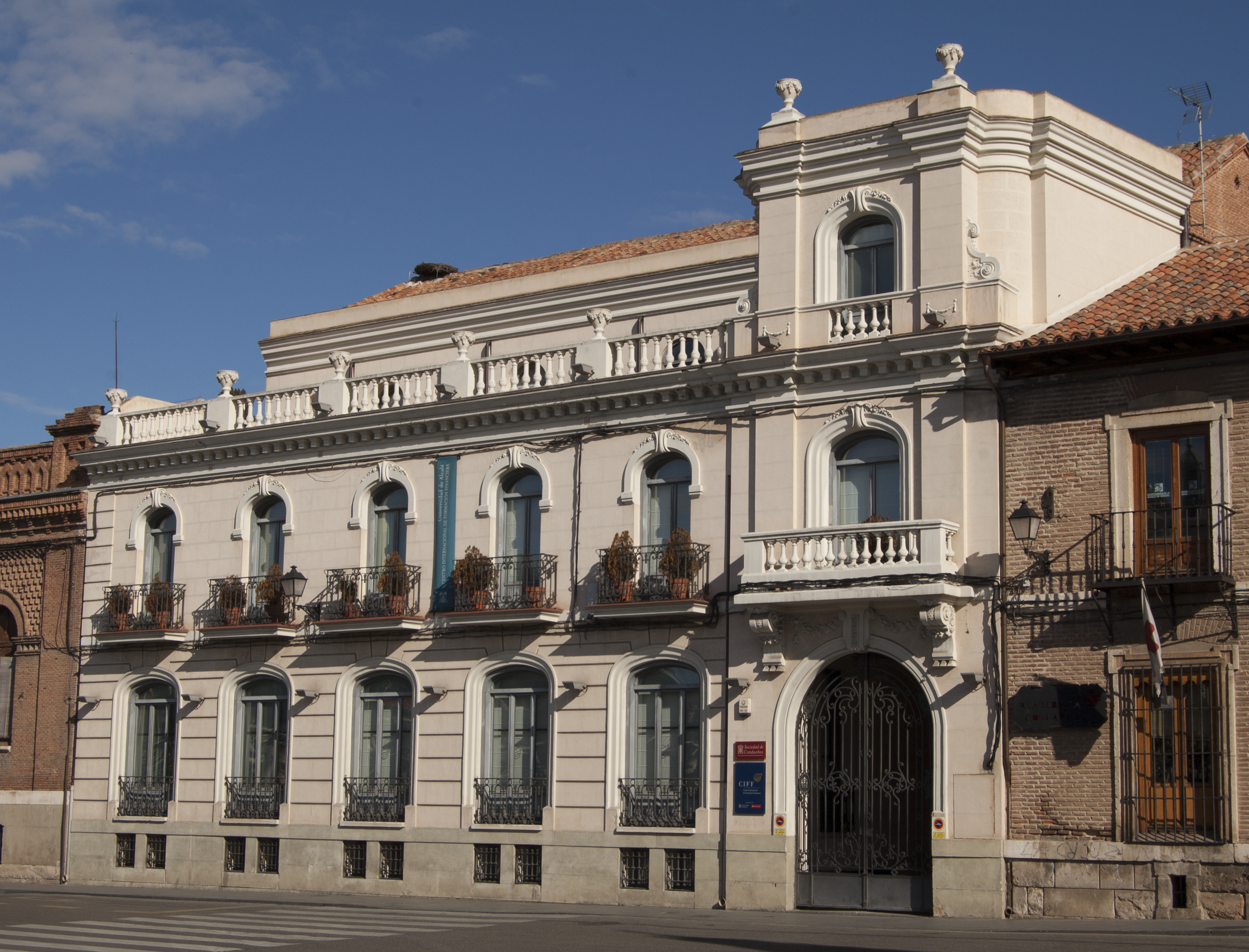 Fachada del Hotel Cervantes en Alcalá de Henares (Comunidad de Madrid - España). Se construyó, entre 1913 y 1916, sobre la antigua cárcel universitaria del Colegio Mayor de San Ildefonso. Posee un callejón que comunica el Patio de los Filósofos de la Universidad de Alcalá con la Plaza de Cervantes, y era por el que salían los estudiantes que aprobaban el examen final de carrera en la Universidad de Alcalá.